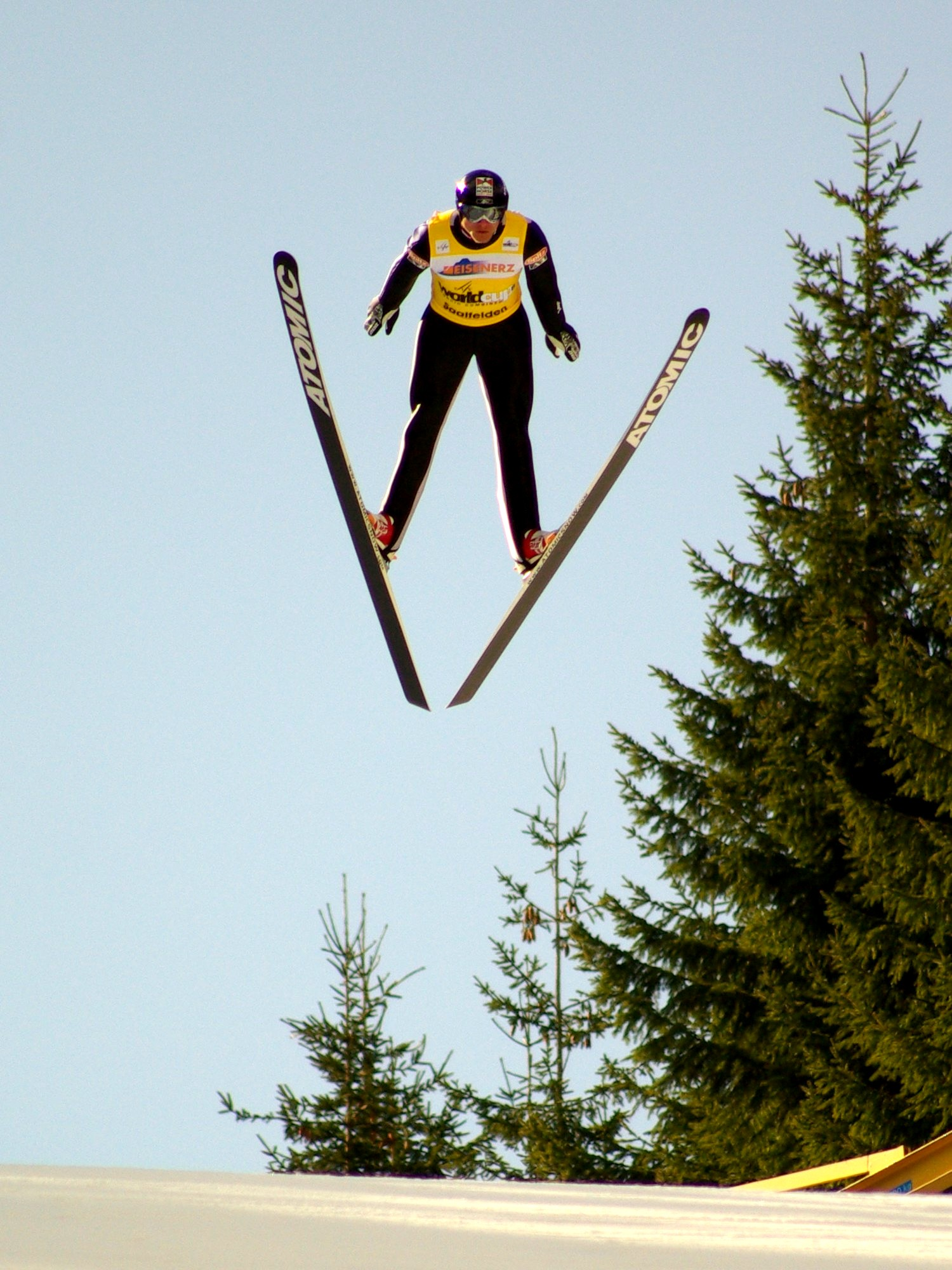 Der österreichische Nordische Kombinierer Marco Pichlmayer während des Sprunglaufs des Sprint-Bewerbes im B-Weltcup in Eisenerz, Österreich am 9. März 2008.